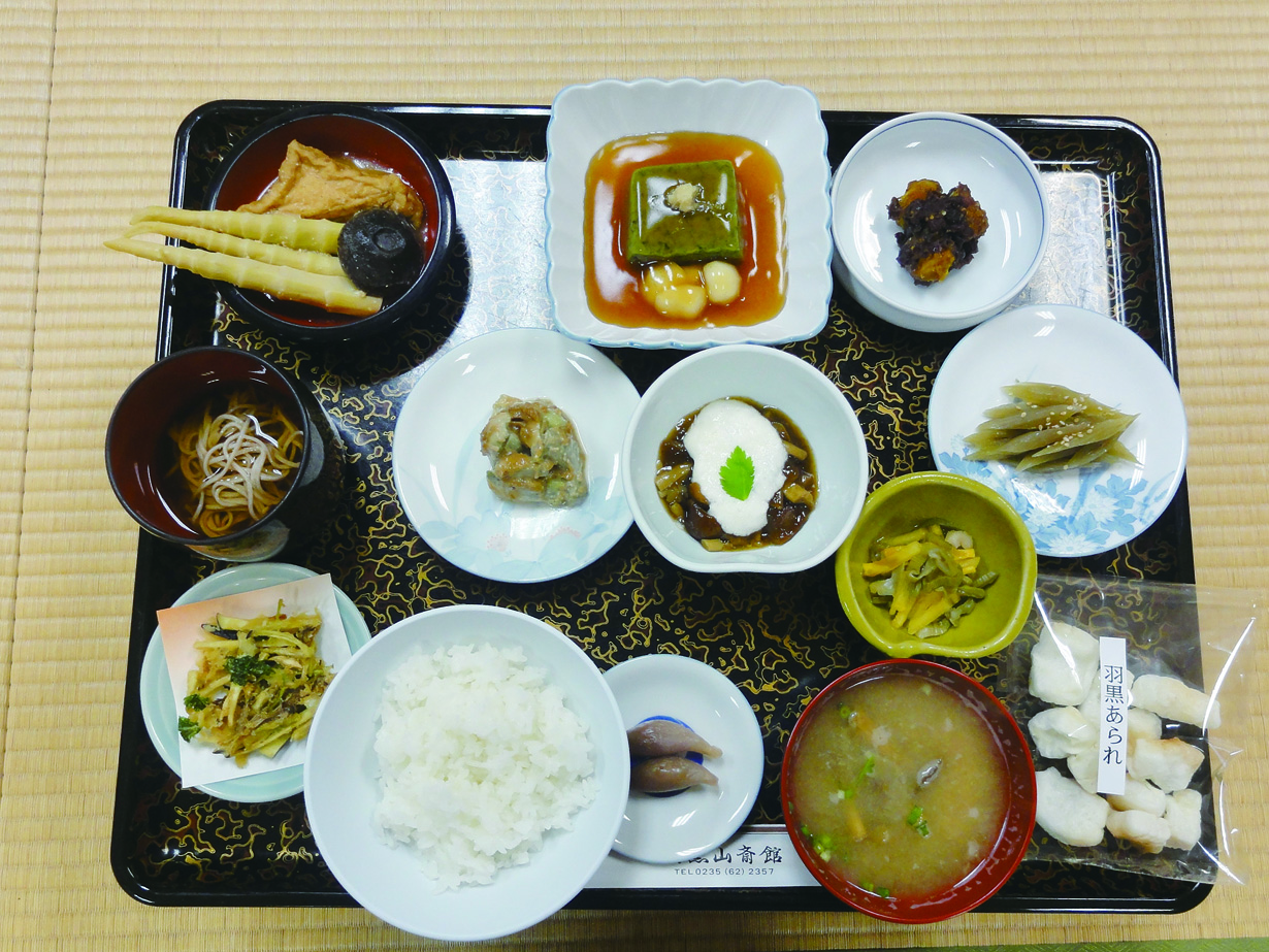 Un des menus les moins chers du mont Haguro